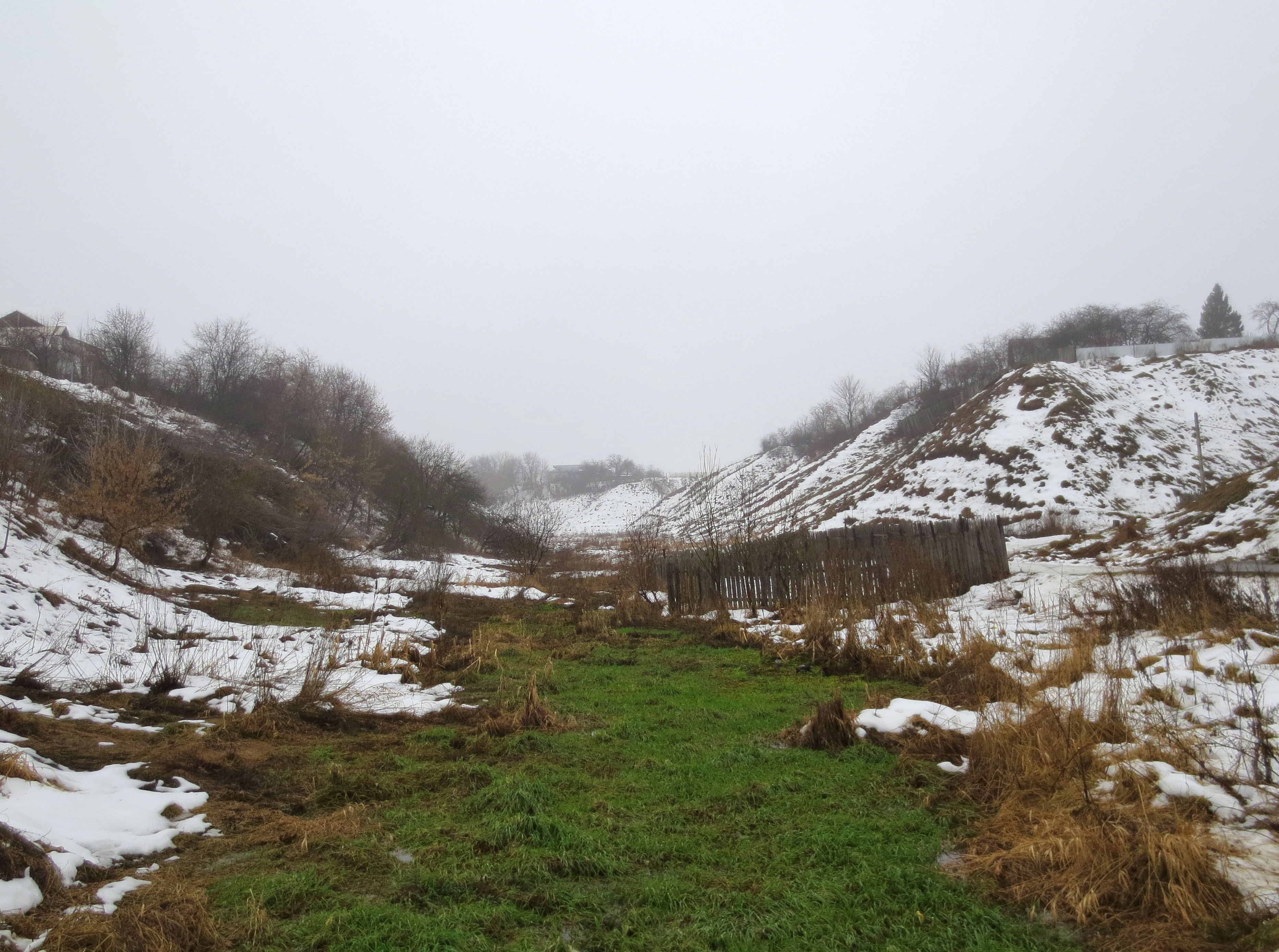 В самом конце оврага находится родник "Карачаровский". This image is related to the protected area of Russia number 3310163